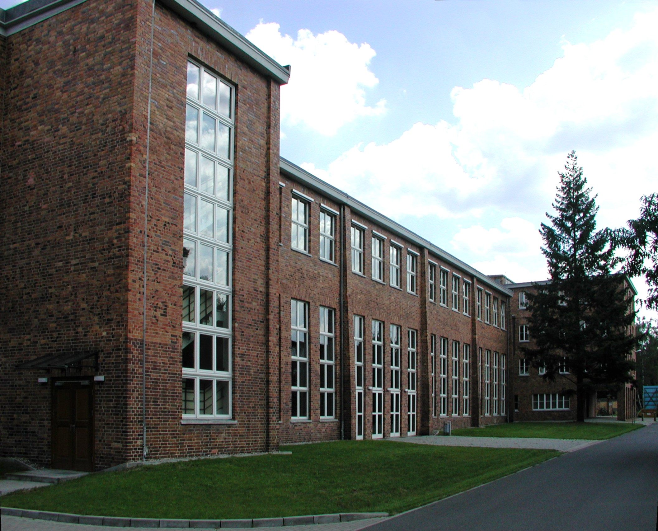 eh. Gewerkschaftsschule Bernau